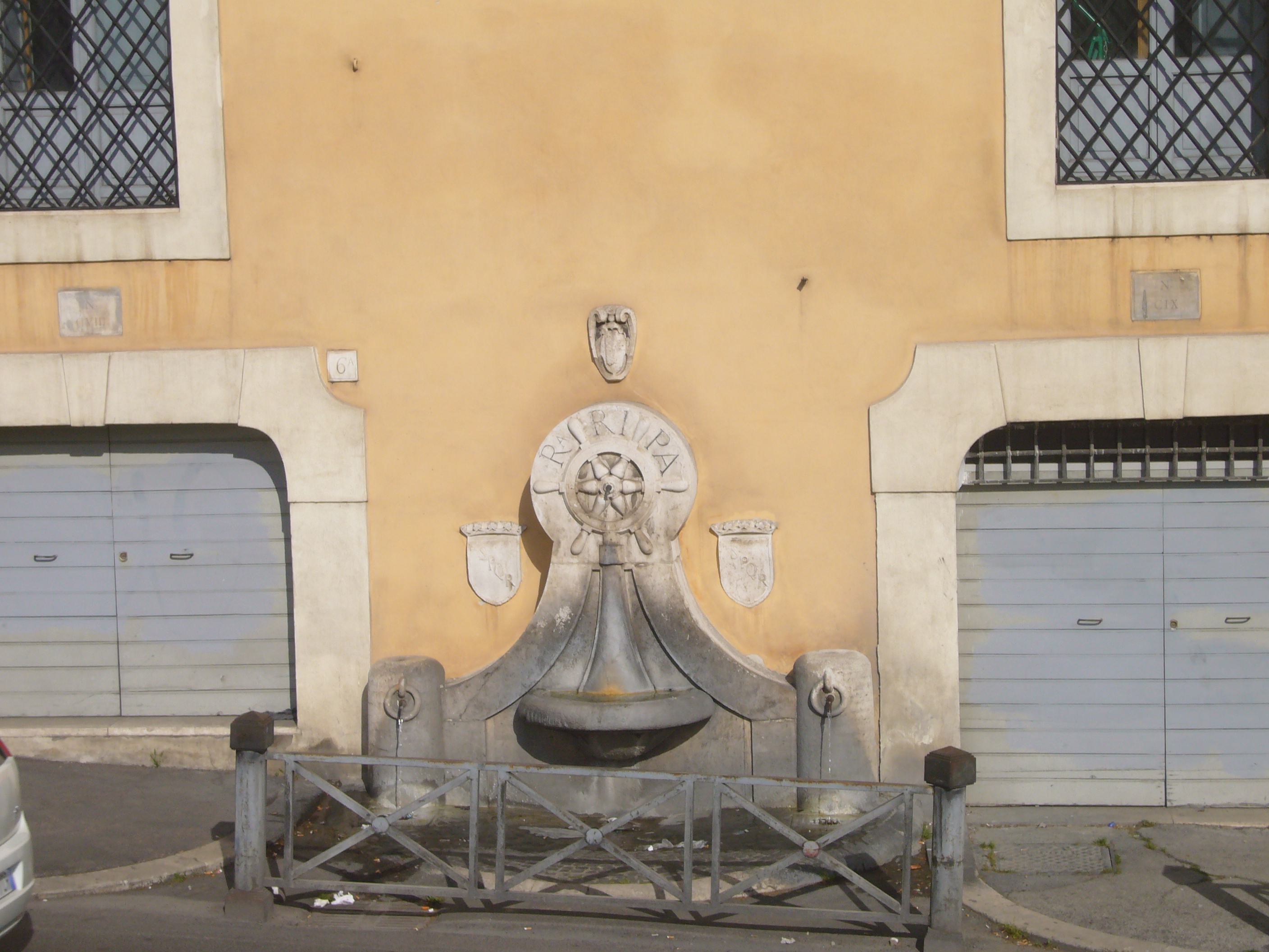 Roma, Fontana del Timone (addossata al complesso del San Michele a Ripa Grande